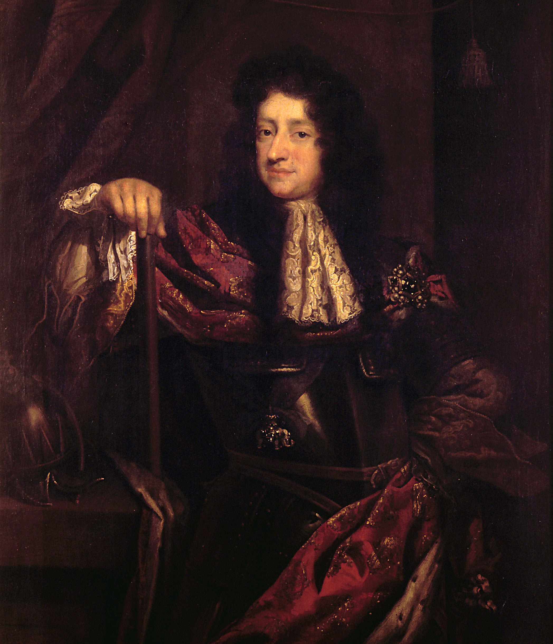 Christian V (1646-1699)